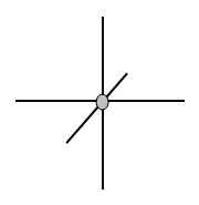 3-dimensional spin network